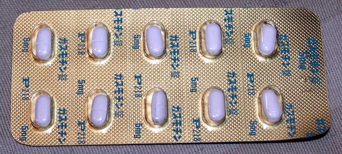 クエン酸モサプリド・ガスモチン